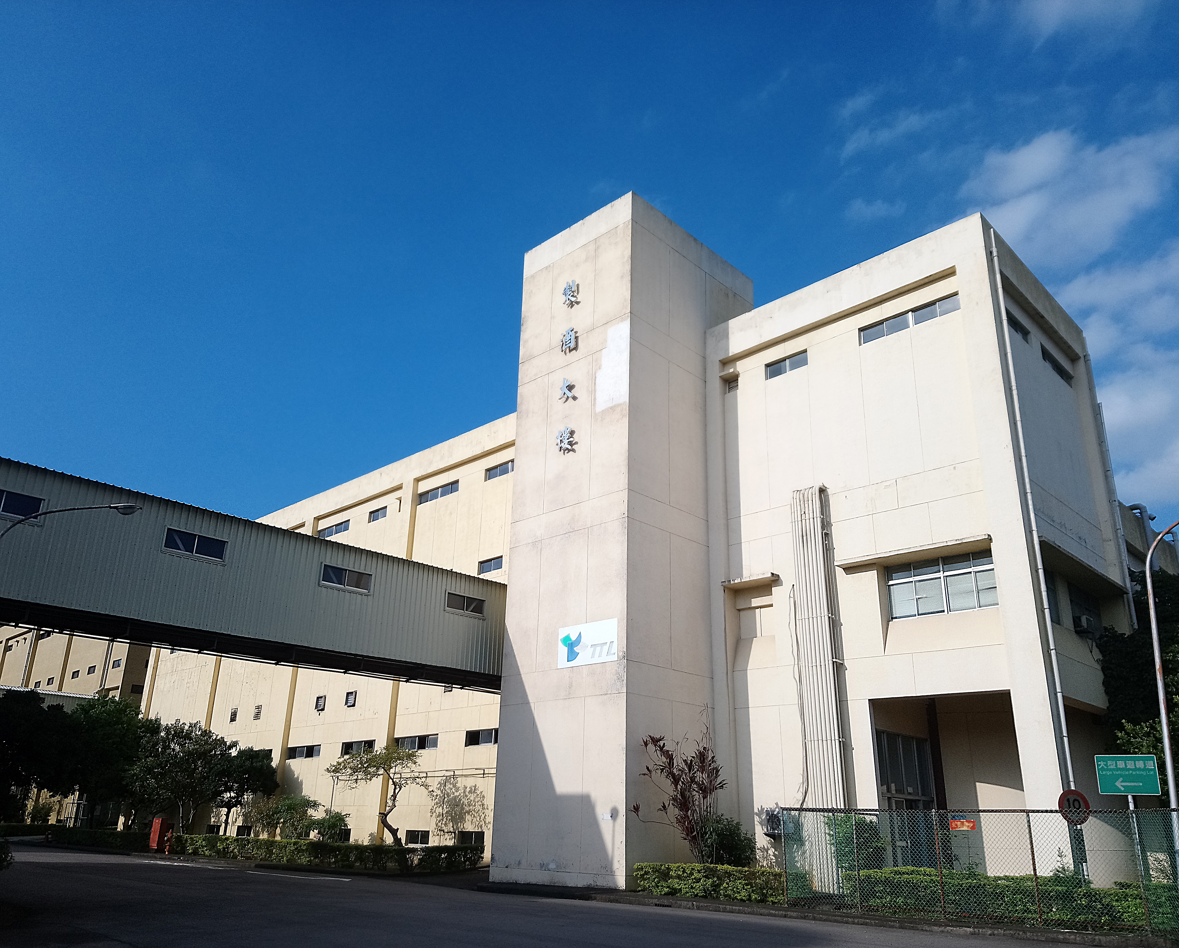 臺灣菸酒股份有限公司桃園酒廠製酒大樓,桃園市龜山區樂善里